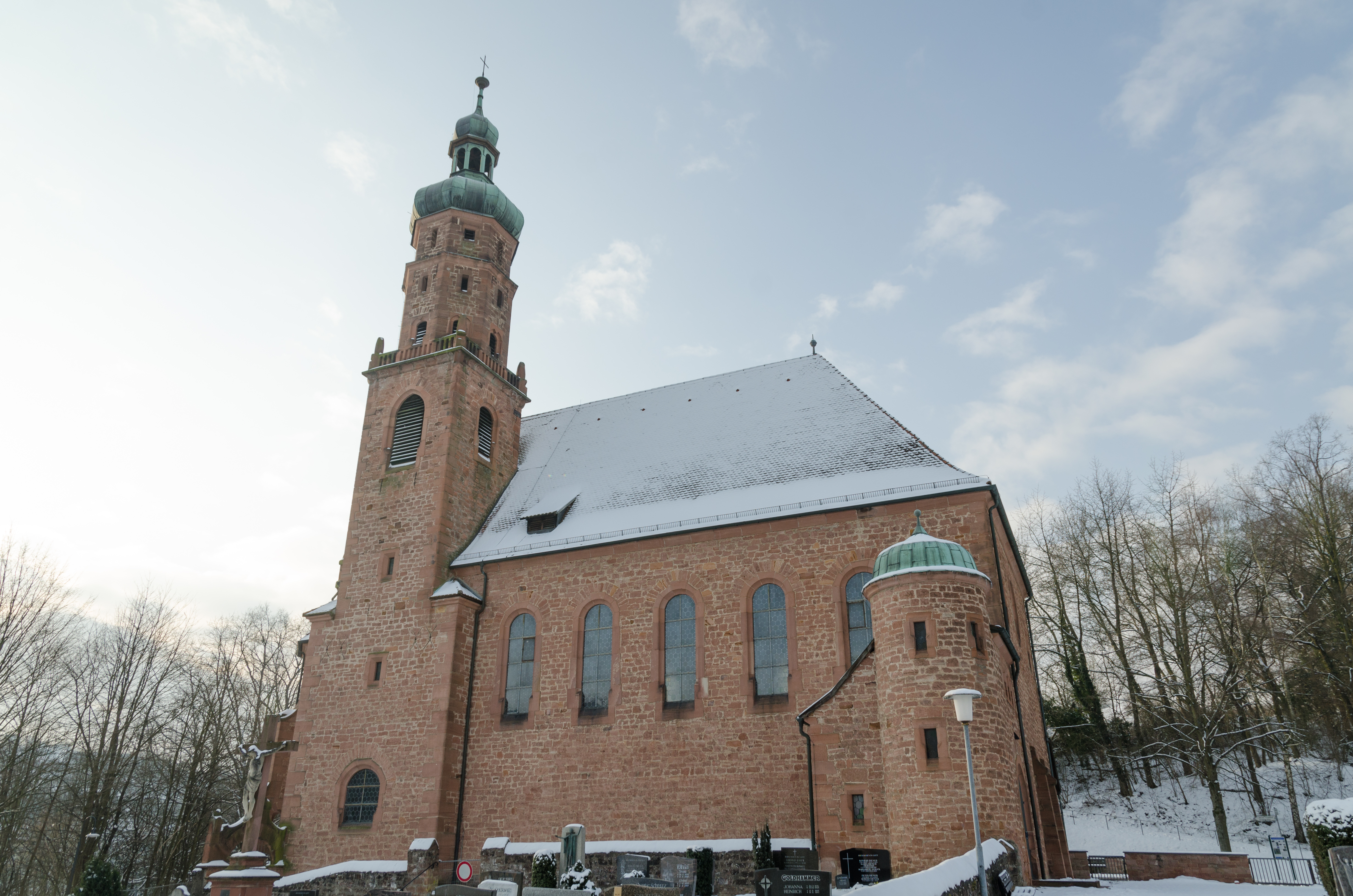 Oberbessenbach, Neue Pfarrkirche